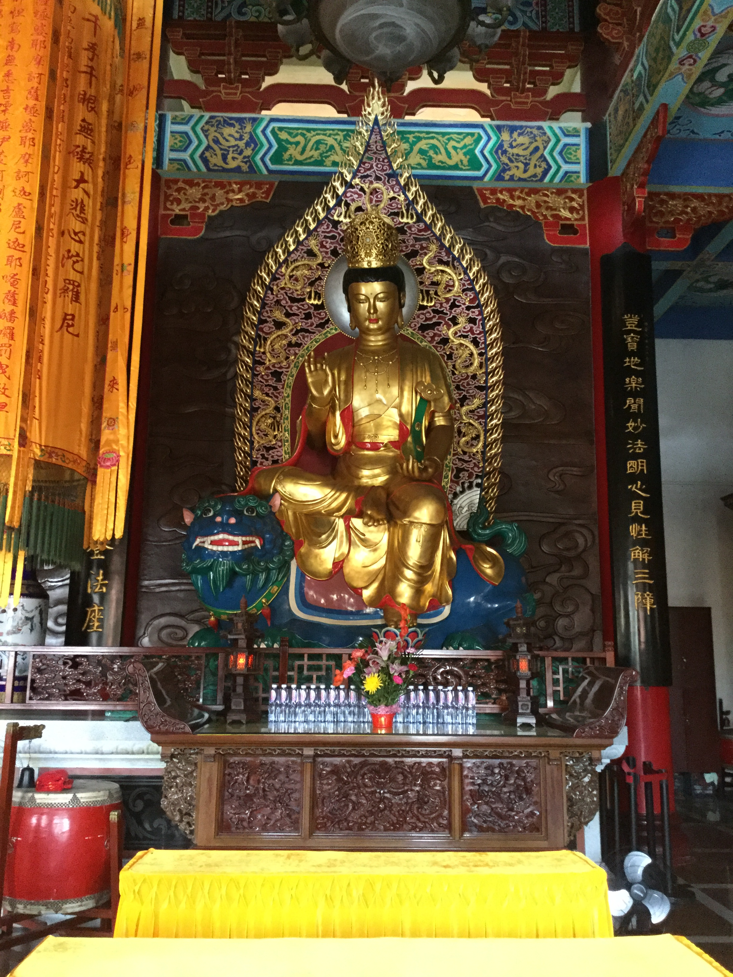 文殊菩萨，汕头天坛花园